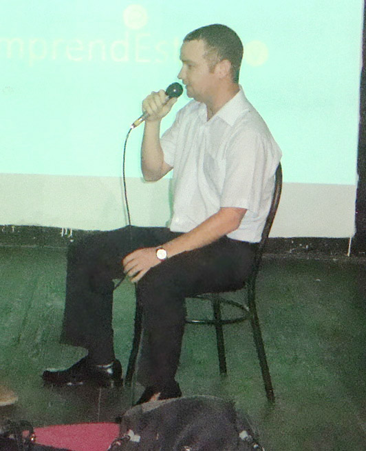 Yosuán Crespo en una entrevista. 30 de mayo de 2015.